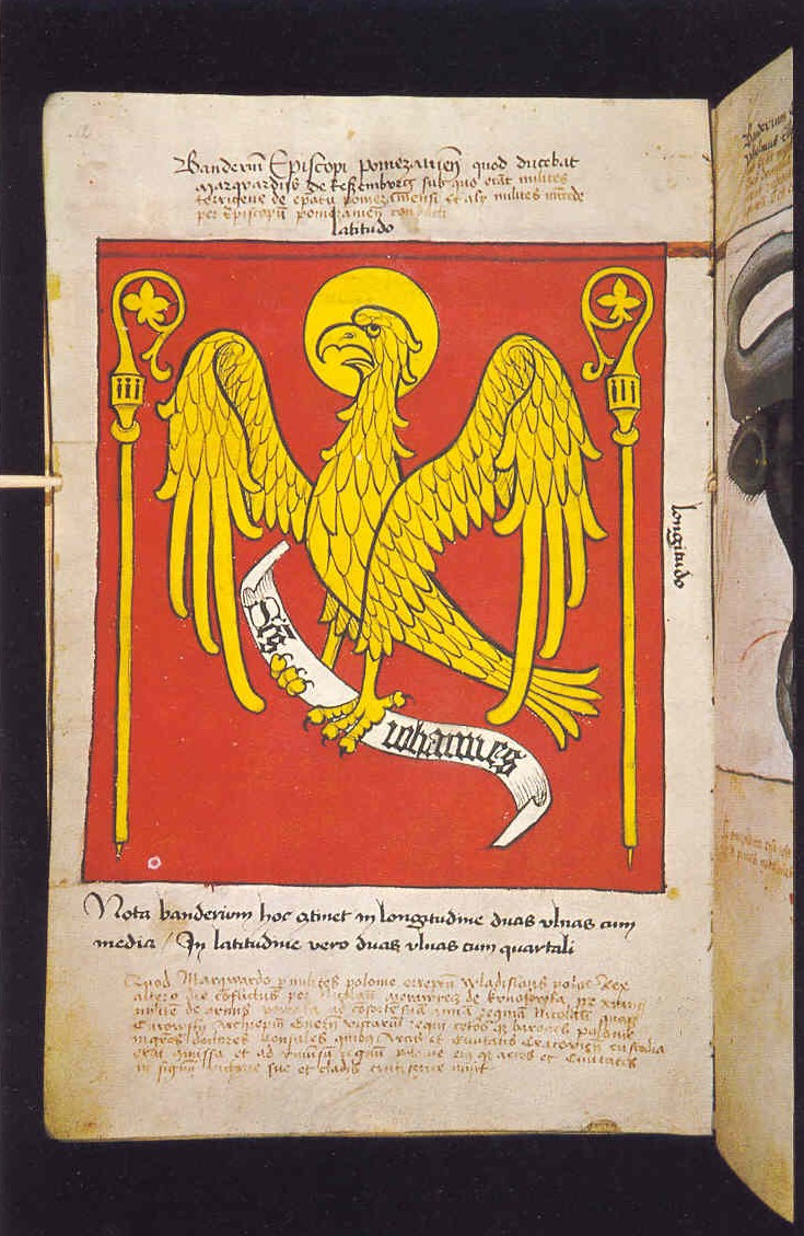 Banderium episcopi Pomezaniensis, quod ducebat Marqvardus de Reszembvrg; sub quo erant milites terrigene de episcopatu Pomezaniensi et alii milites mercede per episcopum Pomezaniensem conducti.